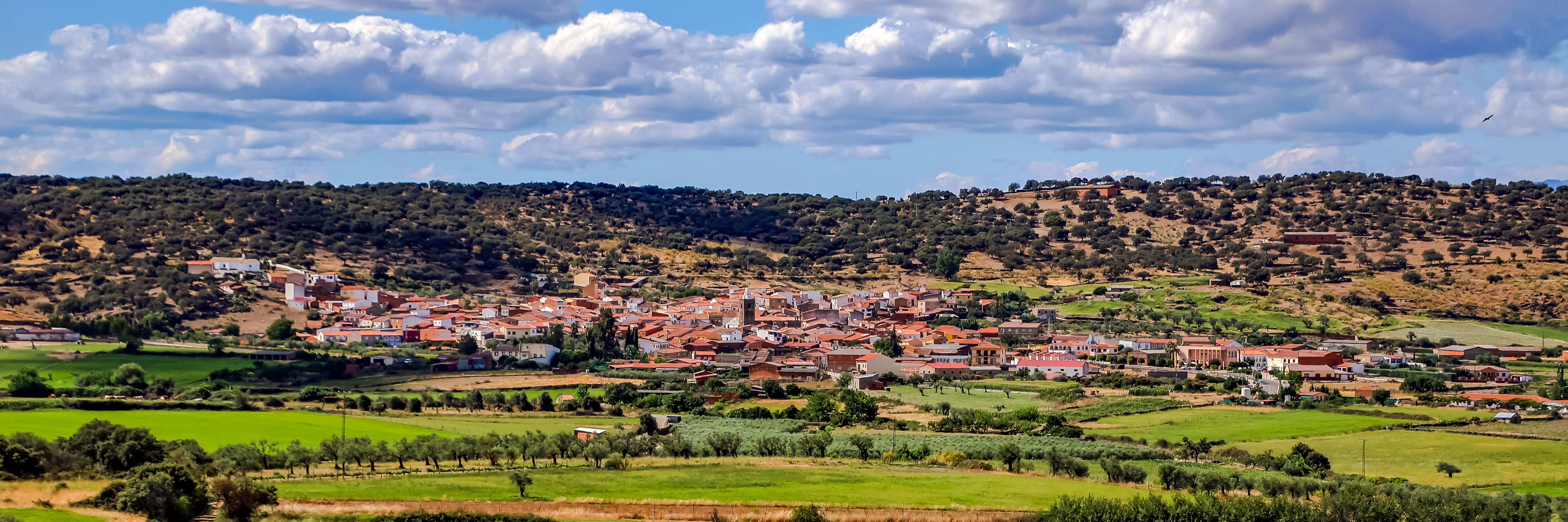 Casillas de Coria es un municipio de la mancomunidad de Rivera de Fresnedosa en la provincia de Cáceres.